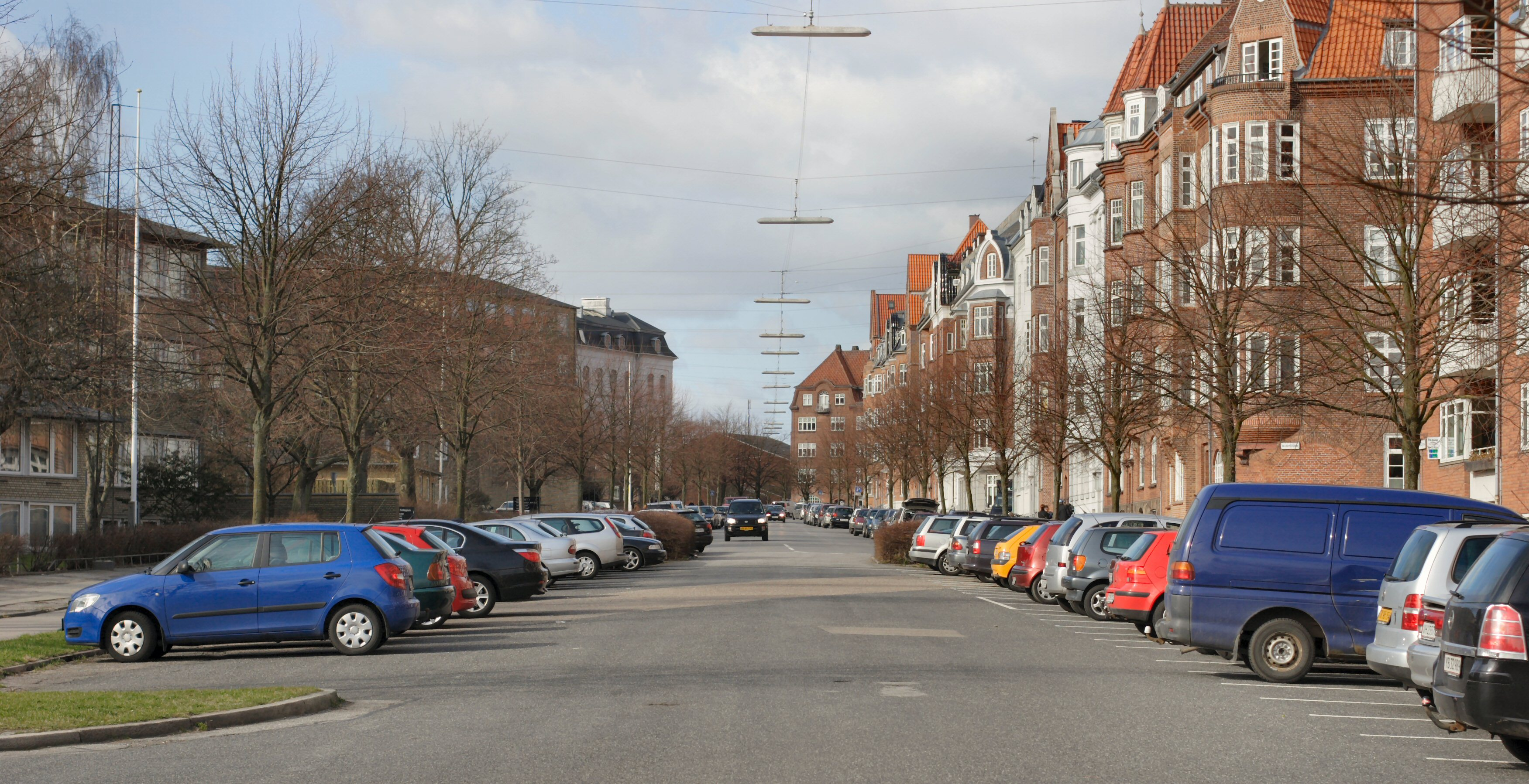 Dalgas Avenue set fra Marselis Boulevard